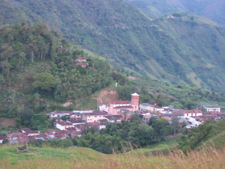 Carerío de la plaza principal de Arma, Tomado desde el Saladero de Cristo Rey a las 4 pm